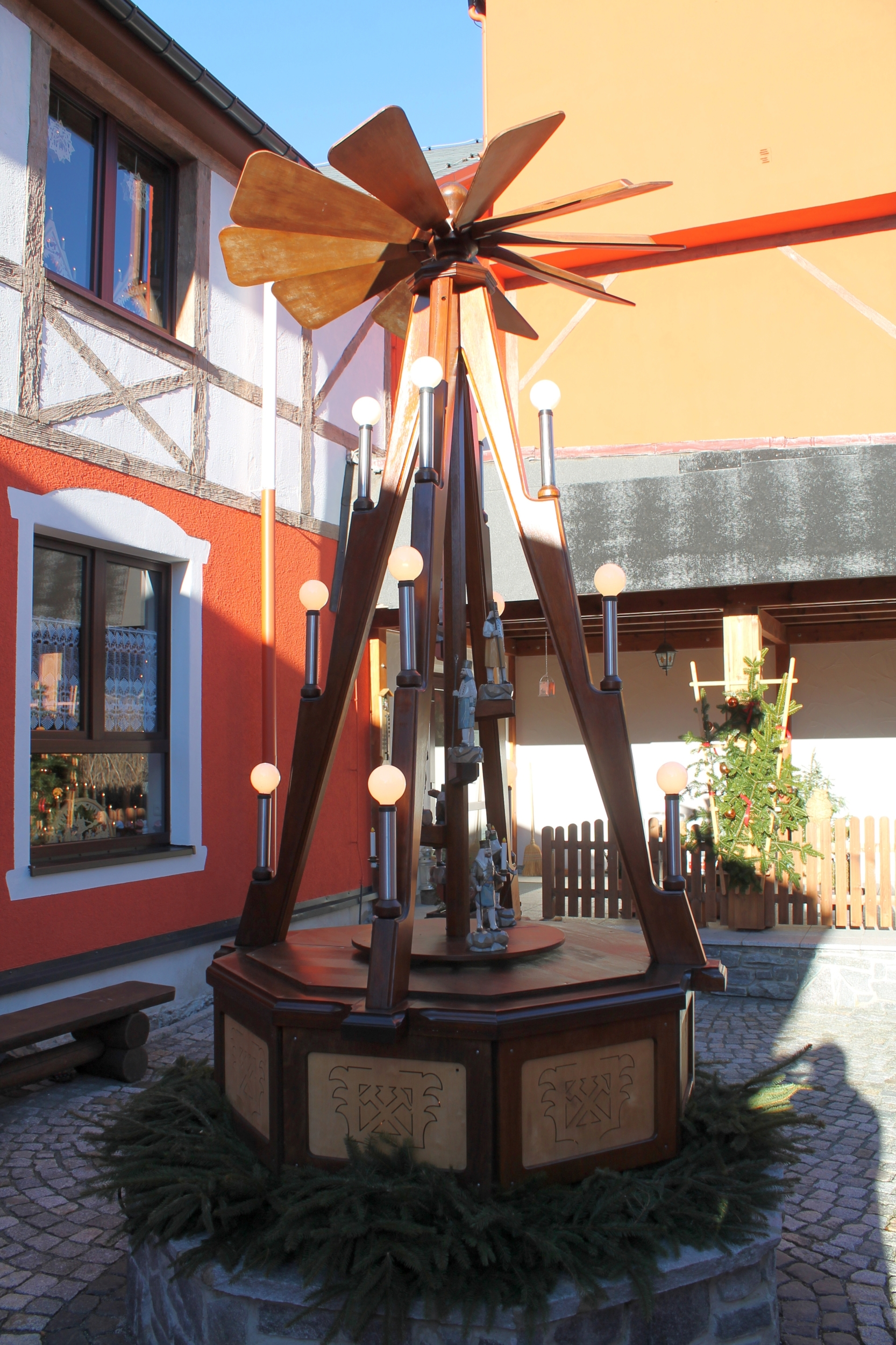 Außenpyramide vor dem Räuchermännchenmuseum Crottendorf, Sachsen, Deutschand.